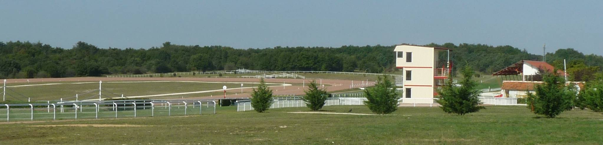 Hippodrome d'Angoulême à la Tourette, la Couronne (16), France